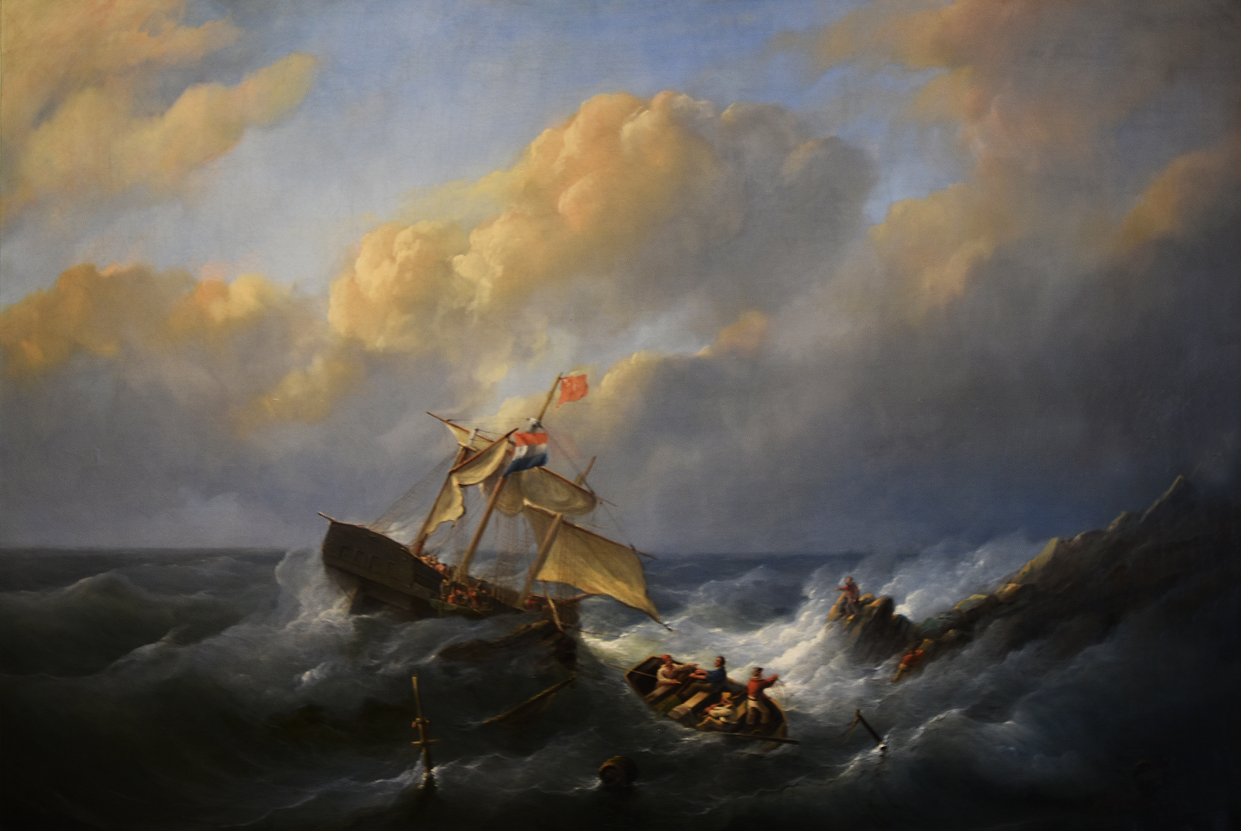 Christian Cornelis Kannemans (1812-1884) - De schipbreuk van het koopvaardijschip Jan Hendrik in 1845 - Noordbrabants Museum Nederland